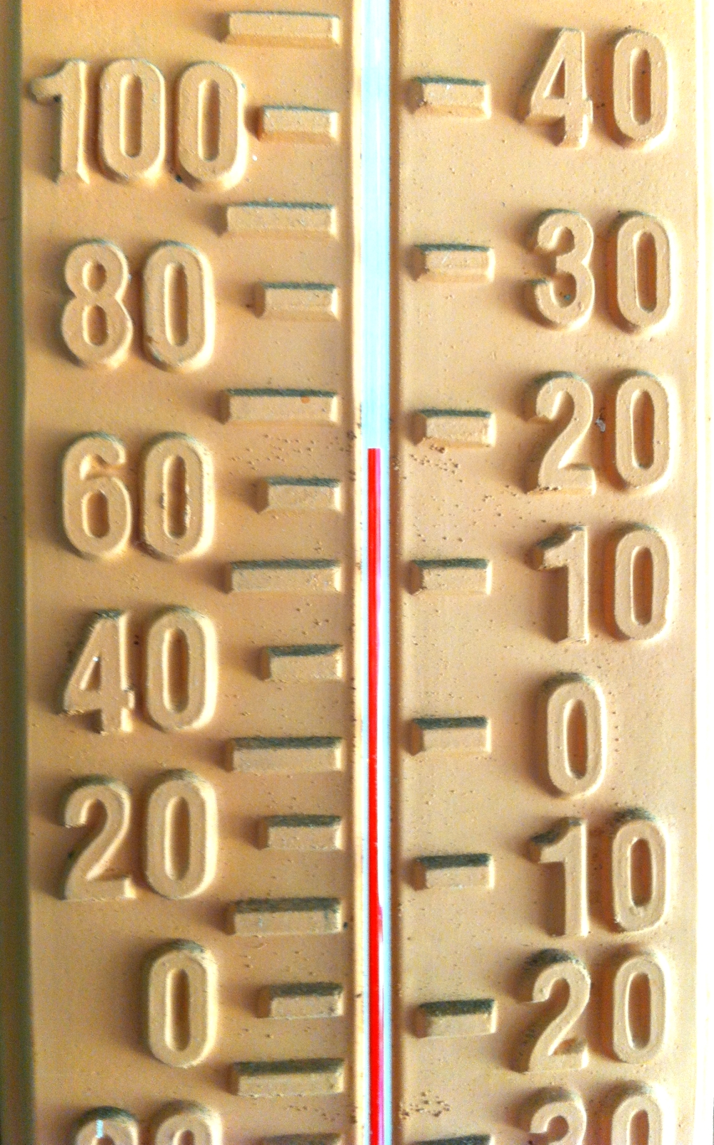 Иллюстрация для викиучебника Гавайеведение